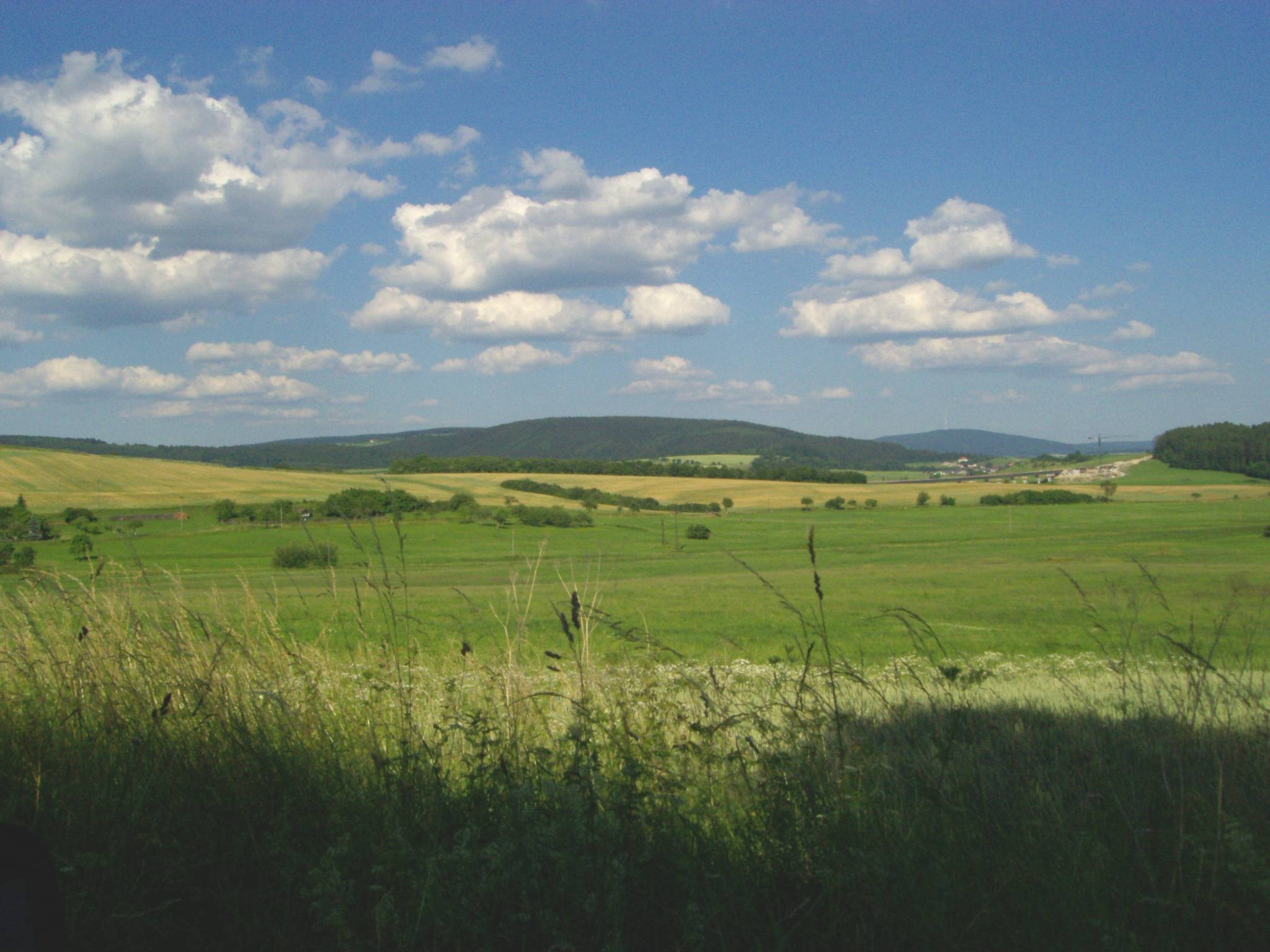 Klingeberg (677 m, Mitte) und Bleßberg (865 m, 195 m Antenne, rechts hinten) im Thüringer Schiefergebirge bei Eisfeld. Links geht der Klingeberg in den Eckartsberg (760 m) über, darunter erkennt man den Ort Waffenrod-Hinterrod auf einer Bergwiese; rechts der Ort Crock und die Trasse der A 73 bei Brünn.